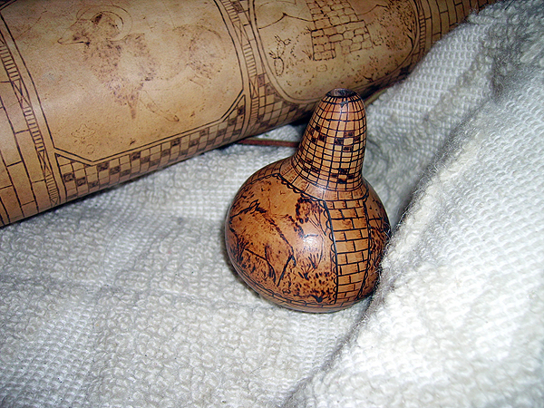 Zucchine Decorate a Fuoco Giba, Sardegna